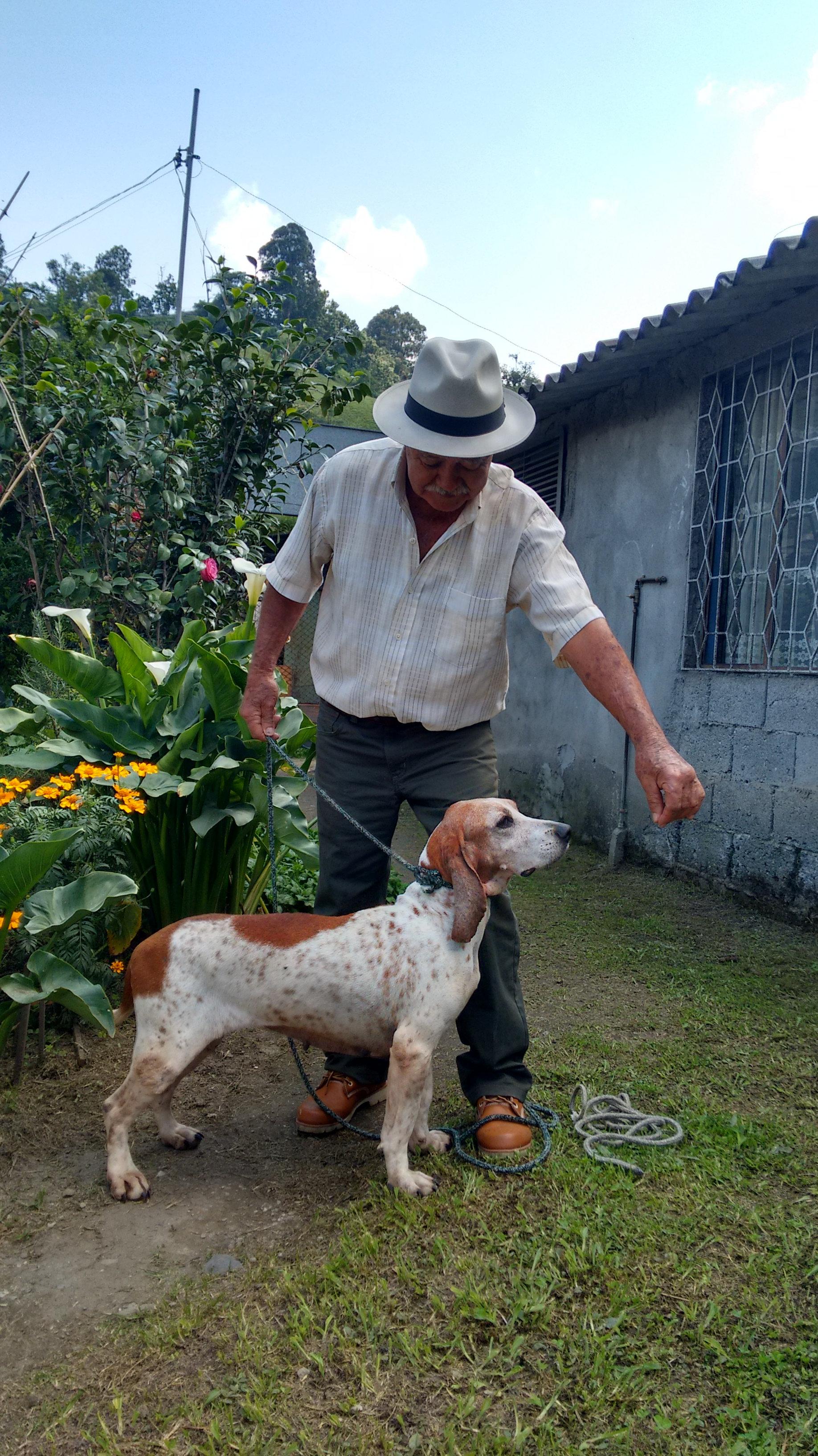 Cazador con su sabueso - Villamaria (Caldas)